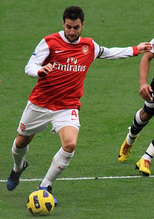 Cesc Fabregas